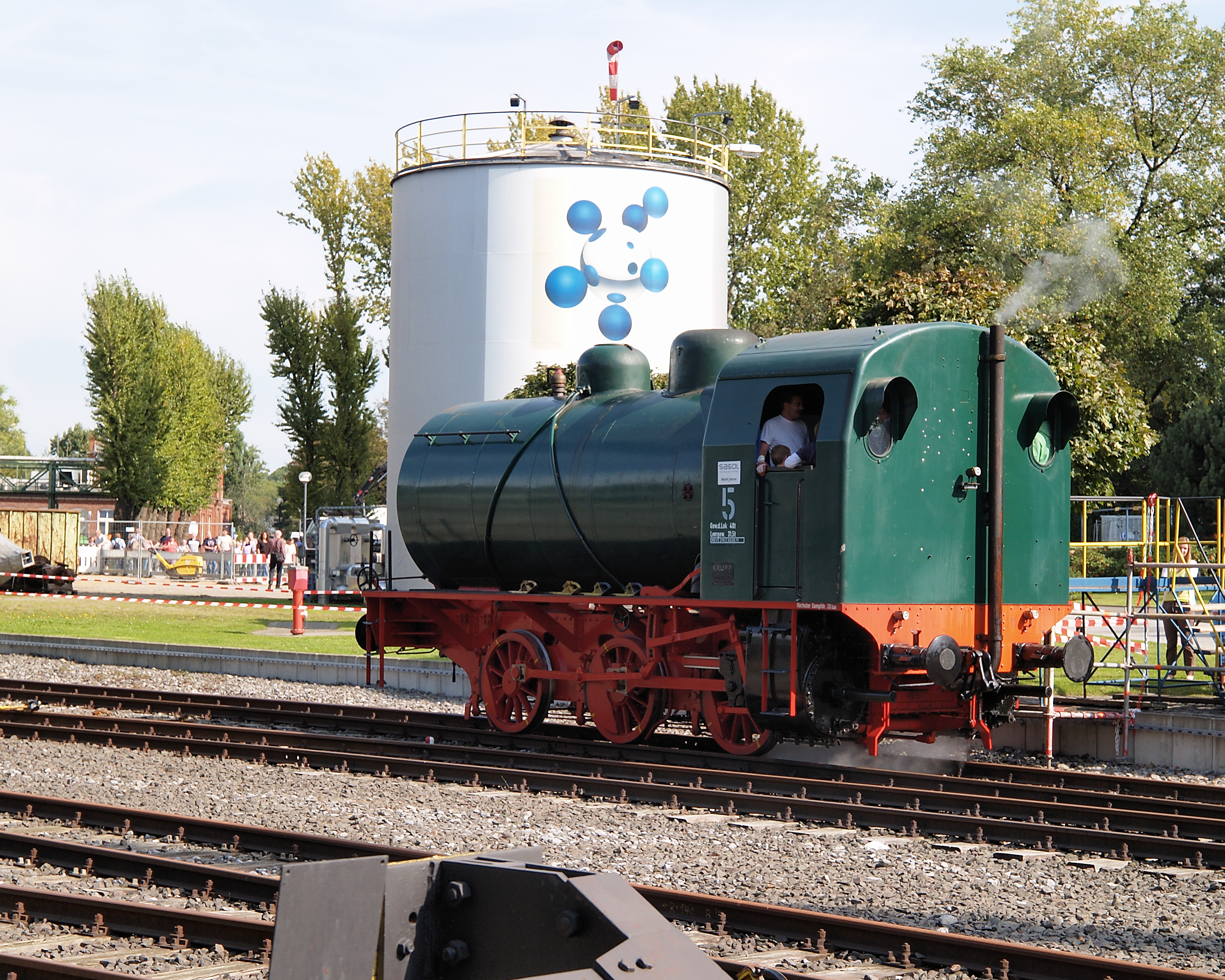 Krupp Dampfspeicherlokomotive in Aktion bei Sasol in Herne, Aufnahme anläßlich des Tags der offenen Tür